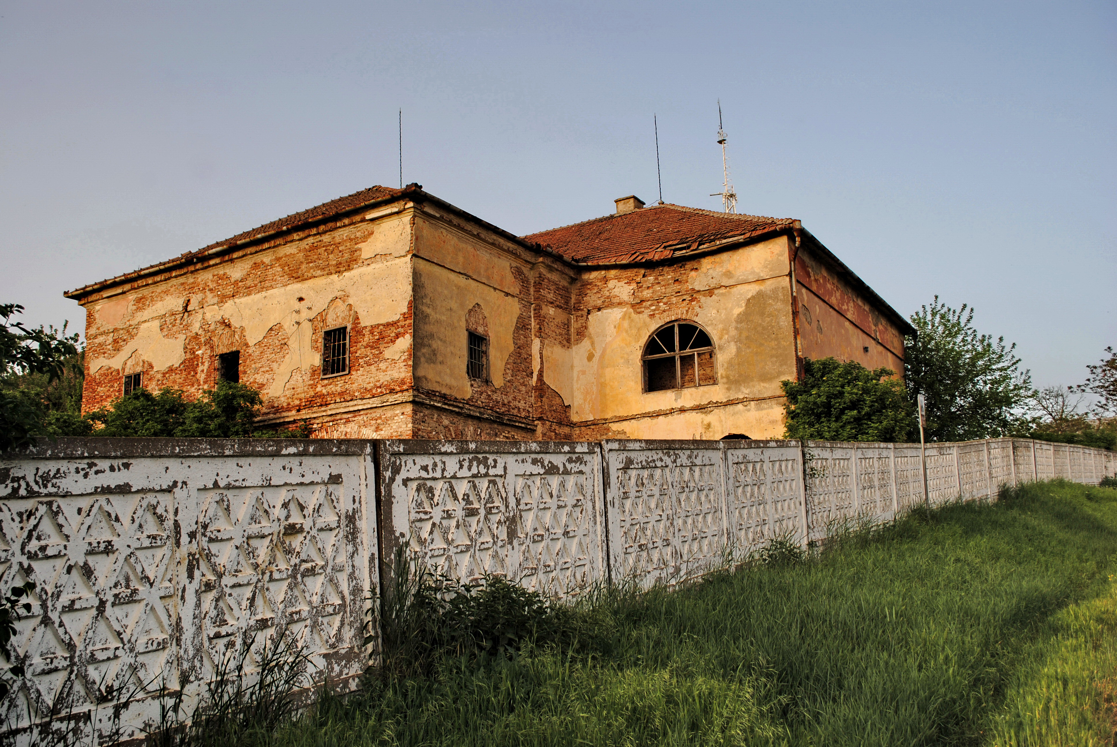 Castelul Contelui de Mercy